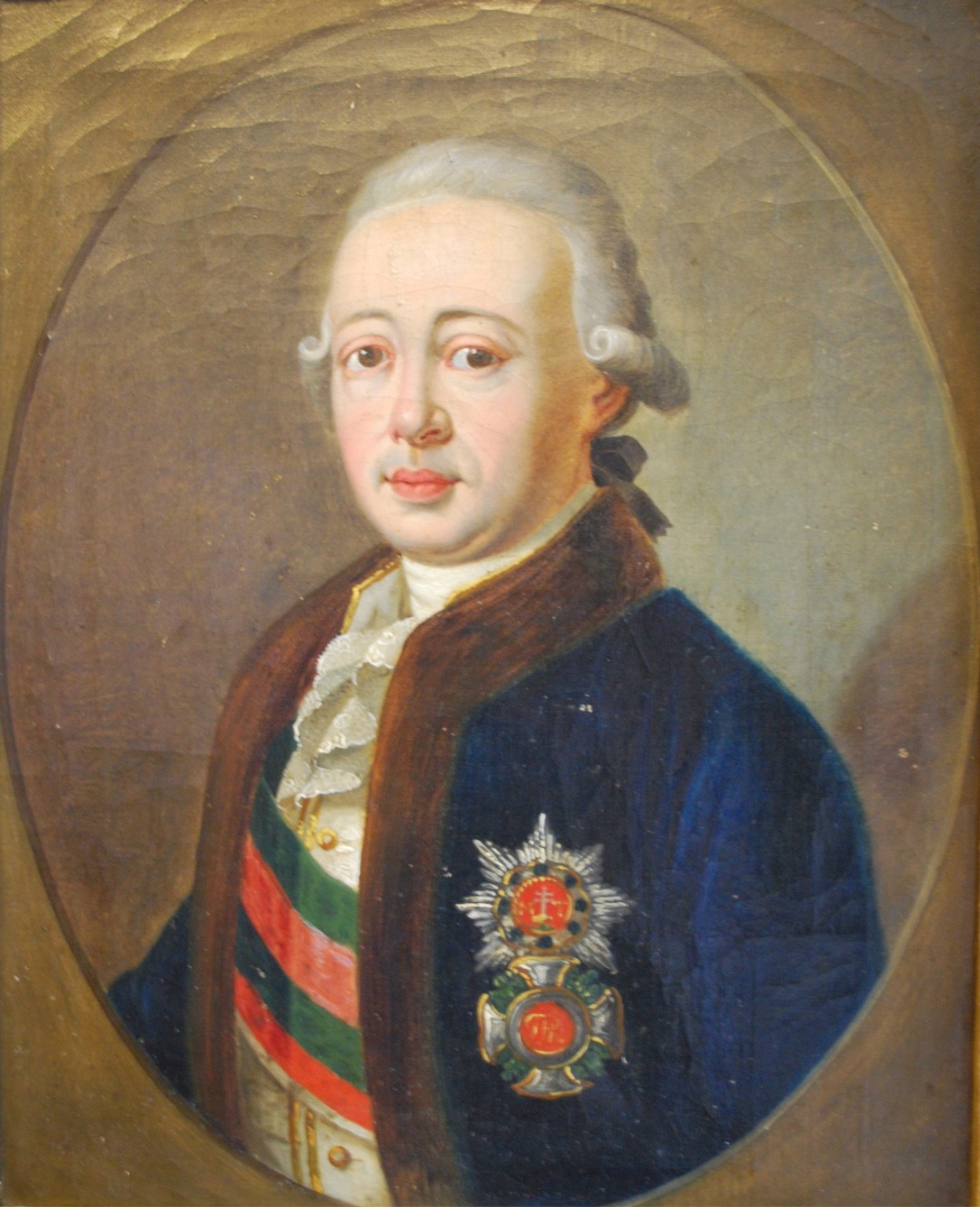 Bánffy György császári és királyi kamarás, Erdély kormányzója.